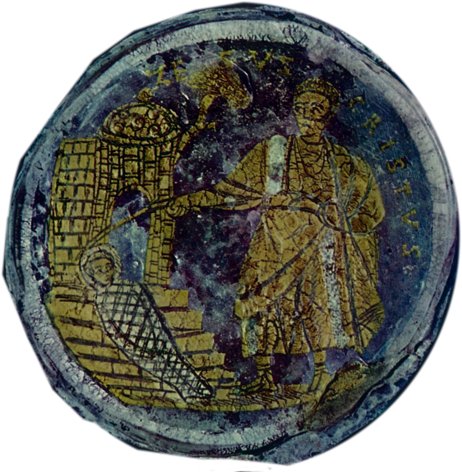 Die Auferweckung des Lazarus, Glas mit Goldmalerei. Rome, Museo Pio Cristiano